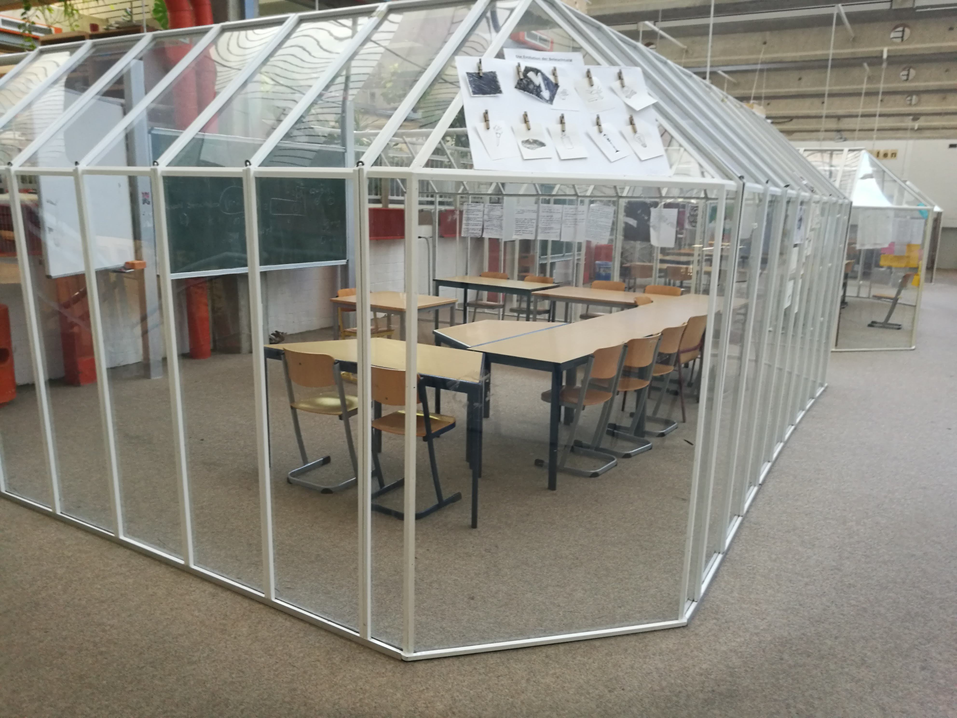 Klassenraum Oberstufenkolleg Bielefeld